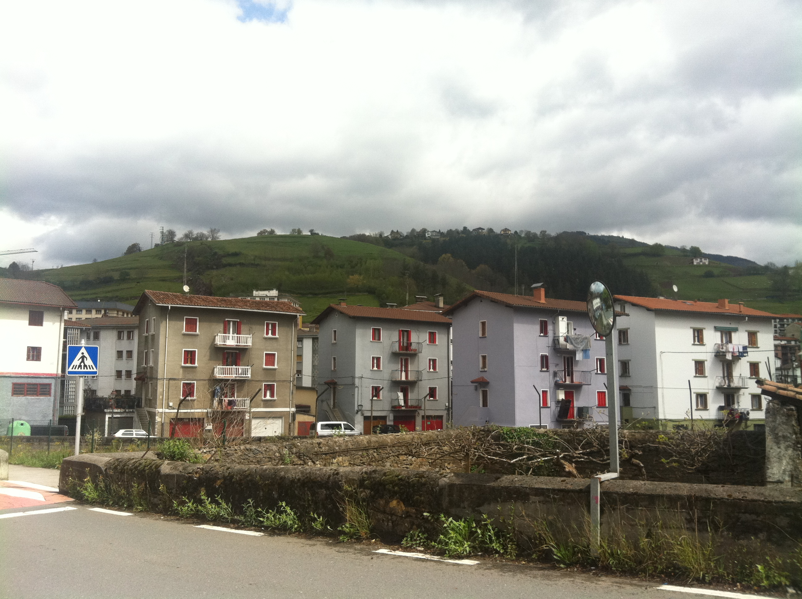 Tolosa Ibarra